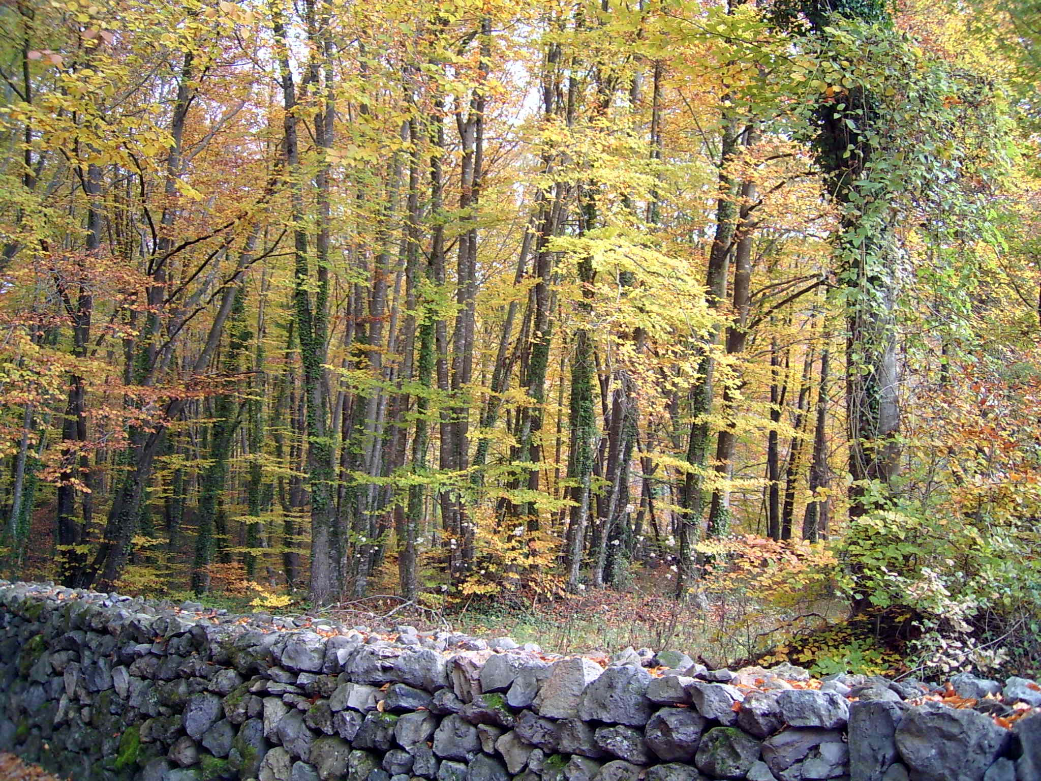 Fagus sylvatica. La Fageda d'en Jordà (Catalonia) - Poesia de Joan Maragall.